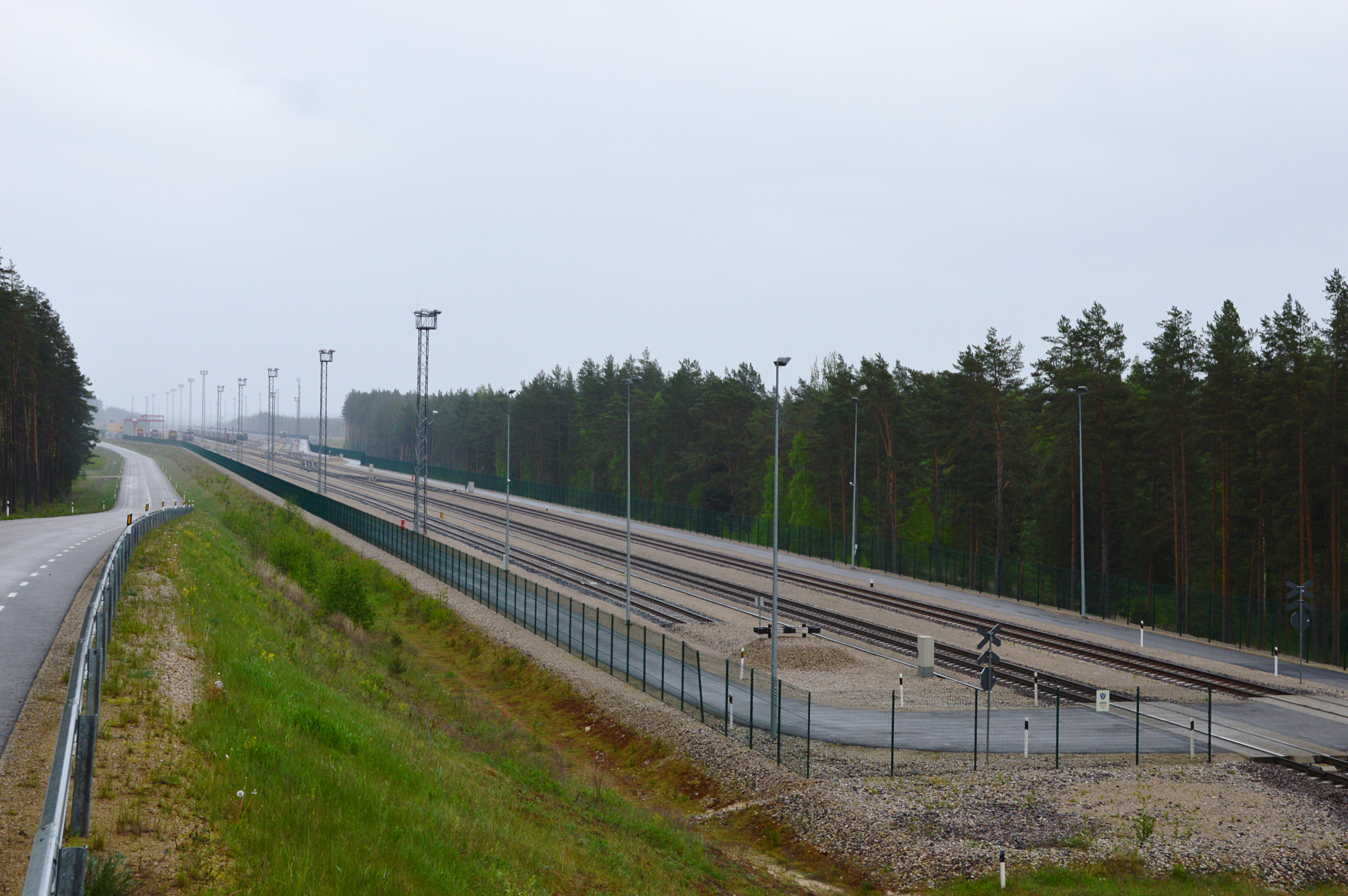 Koidula raudteejaam.